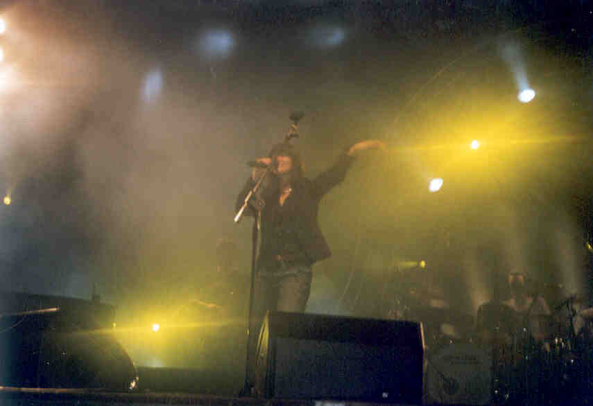 Questa foto l'ho fatta durante il concerto che Elisa ha tenuto il 17/8/2005 a Francavilla al mare per la festa di S. Franco, il santo patrono di questa cittadina. Aggiungo, inoltre, che questa foto è visualizzabile anche nel sito nella sezione concerti nella pgina relativa proprio a questa data del tour. Ciò non è dovuto al fatto che l'abbia presa da lì, ma semplicemente ho inviato anche a questo sito la suddetta immagine. Andando nella sezione news di questo stesso sito, infatti, è possibile leggere proprio il ringraziamento a un tale Marco(ramsesII), che sono io. Licenza:GFDL. 14:17, 2 set 2005 RamsesII 855x586 (22863 bytes) (E' una foto fatta durante un concerto)